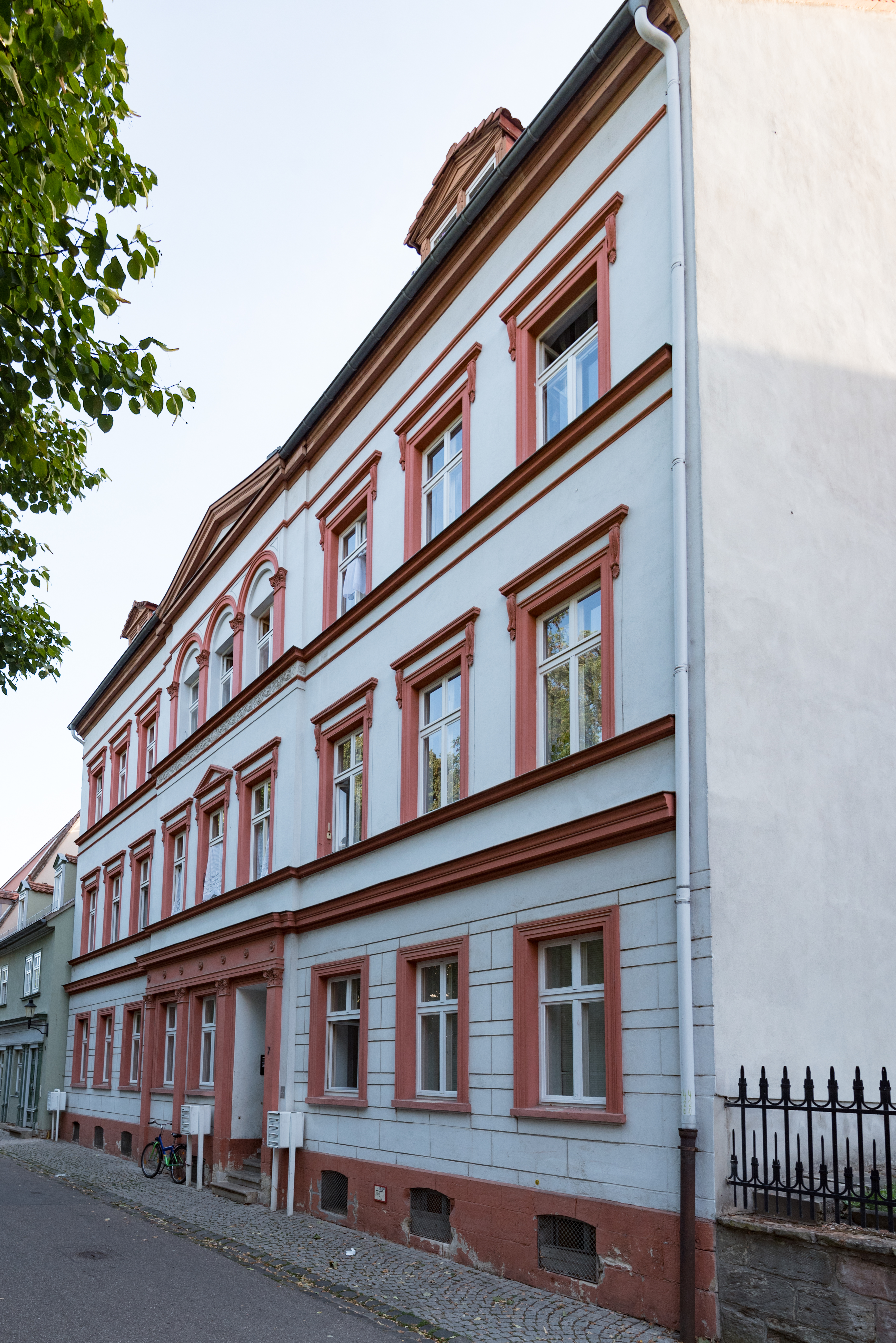 Naumburg (Saale), Kramerplatz 7